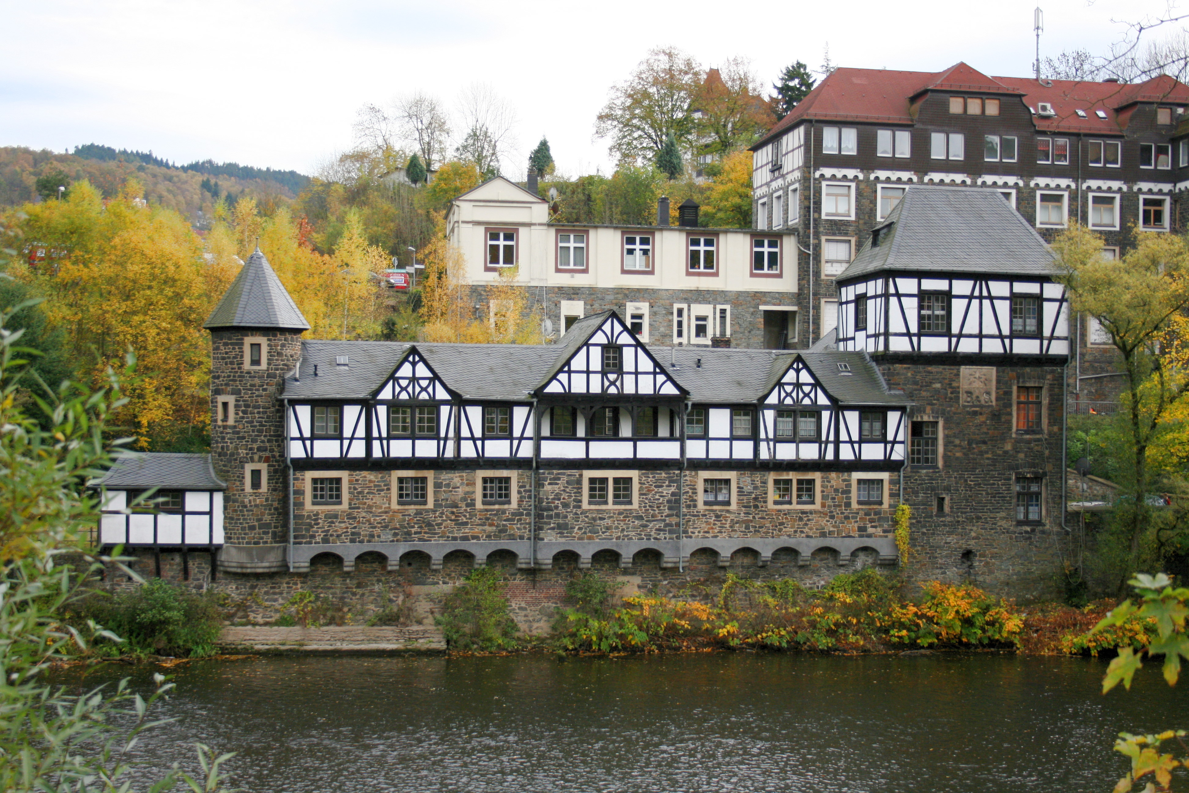 Basse & Selve in Altena This image shows a heritage building in Germany, located in the North Rhine-Westphalian city Altena (no. A-55).